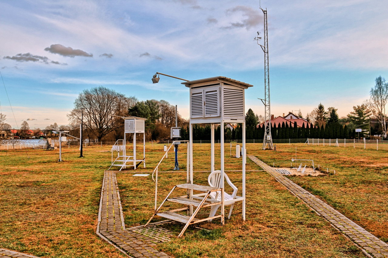 Radzyń, stacja hydrologiczna IMGW